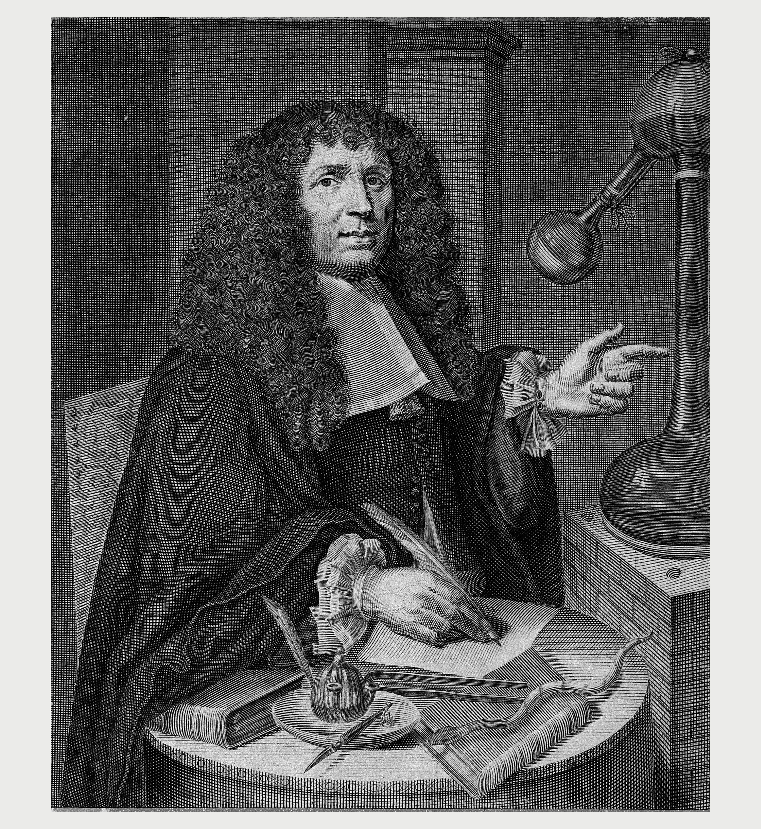 Portrait Moyse Charas